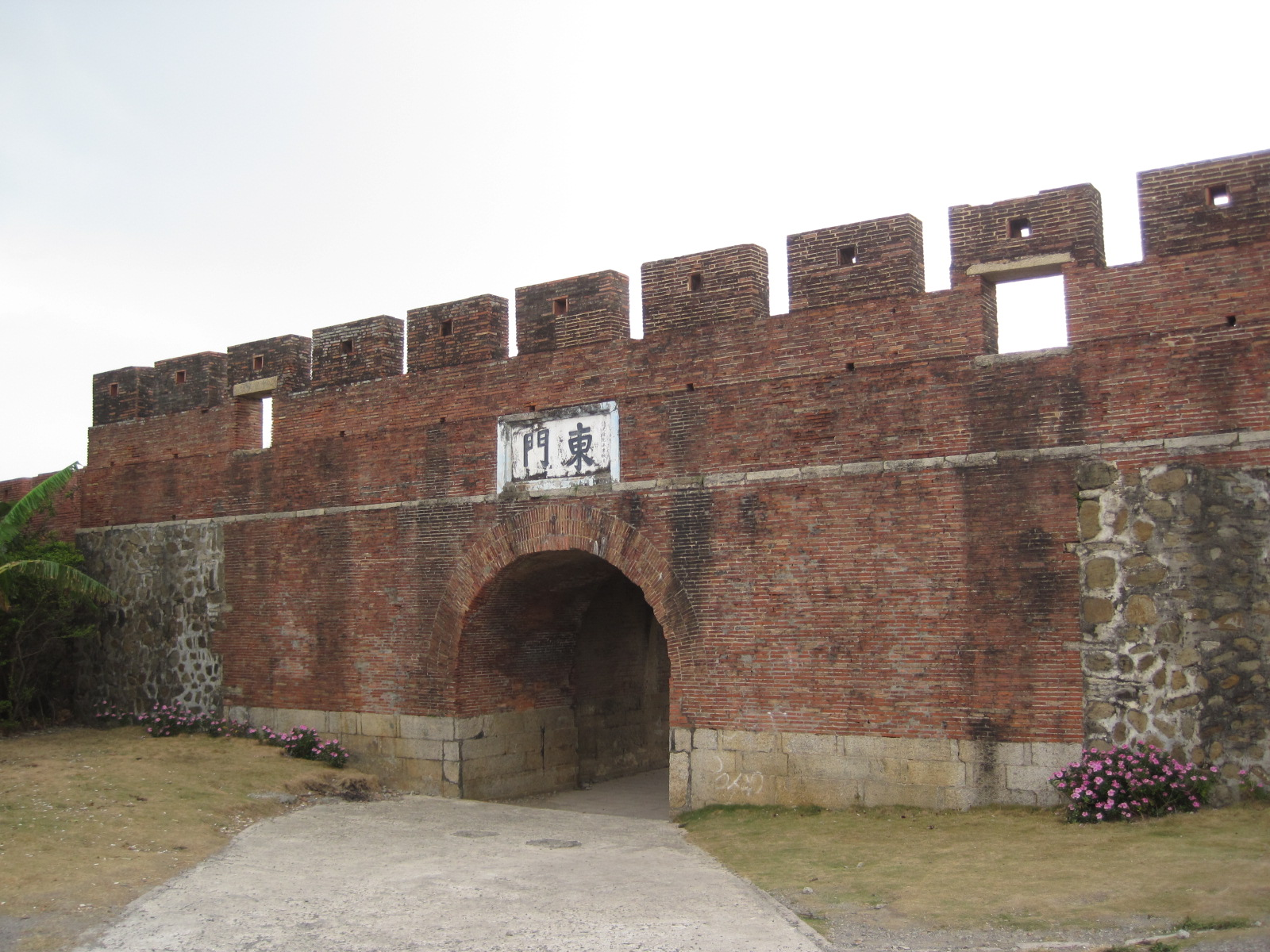 恆春縣城東門